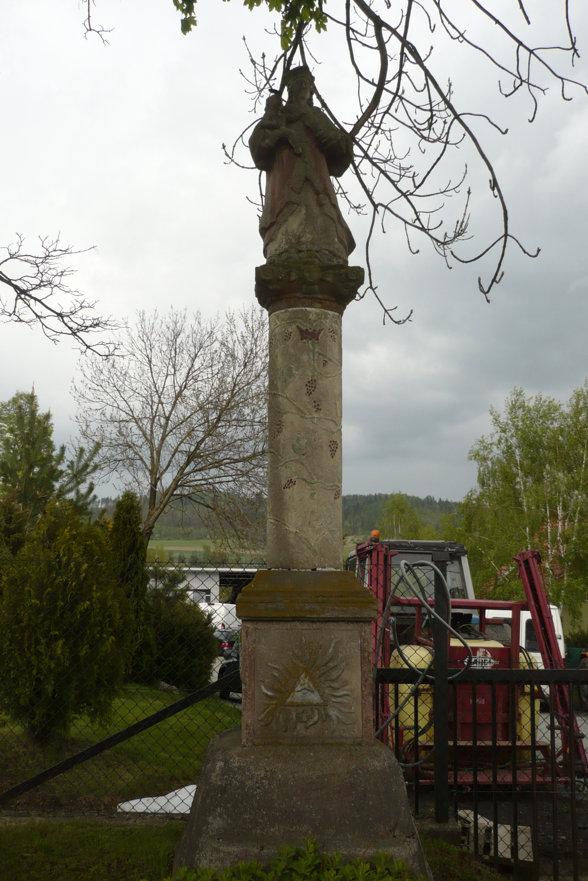 Piszkowice. Kolumna